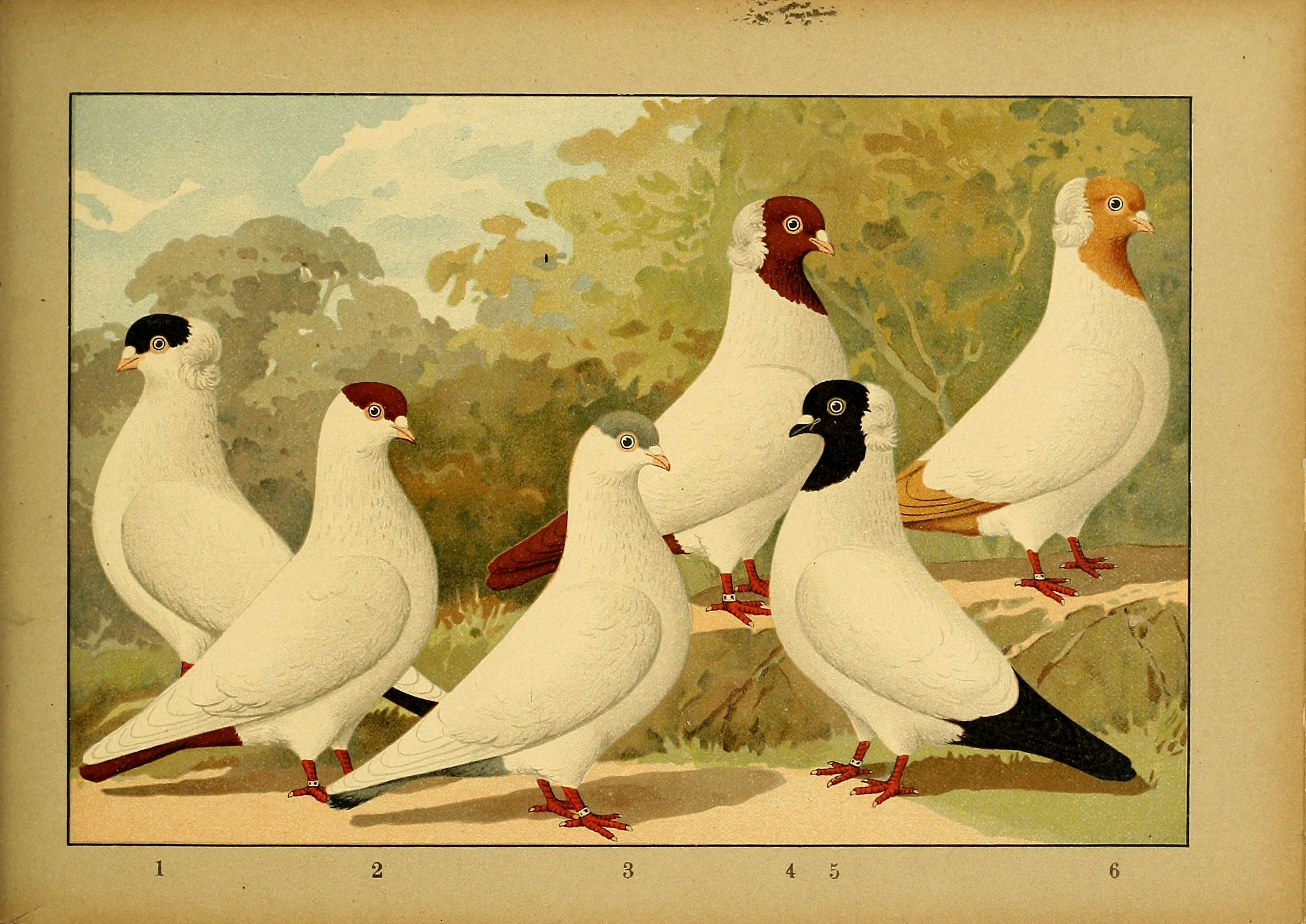 Deutsch